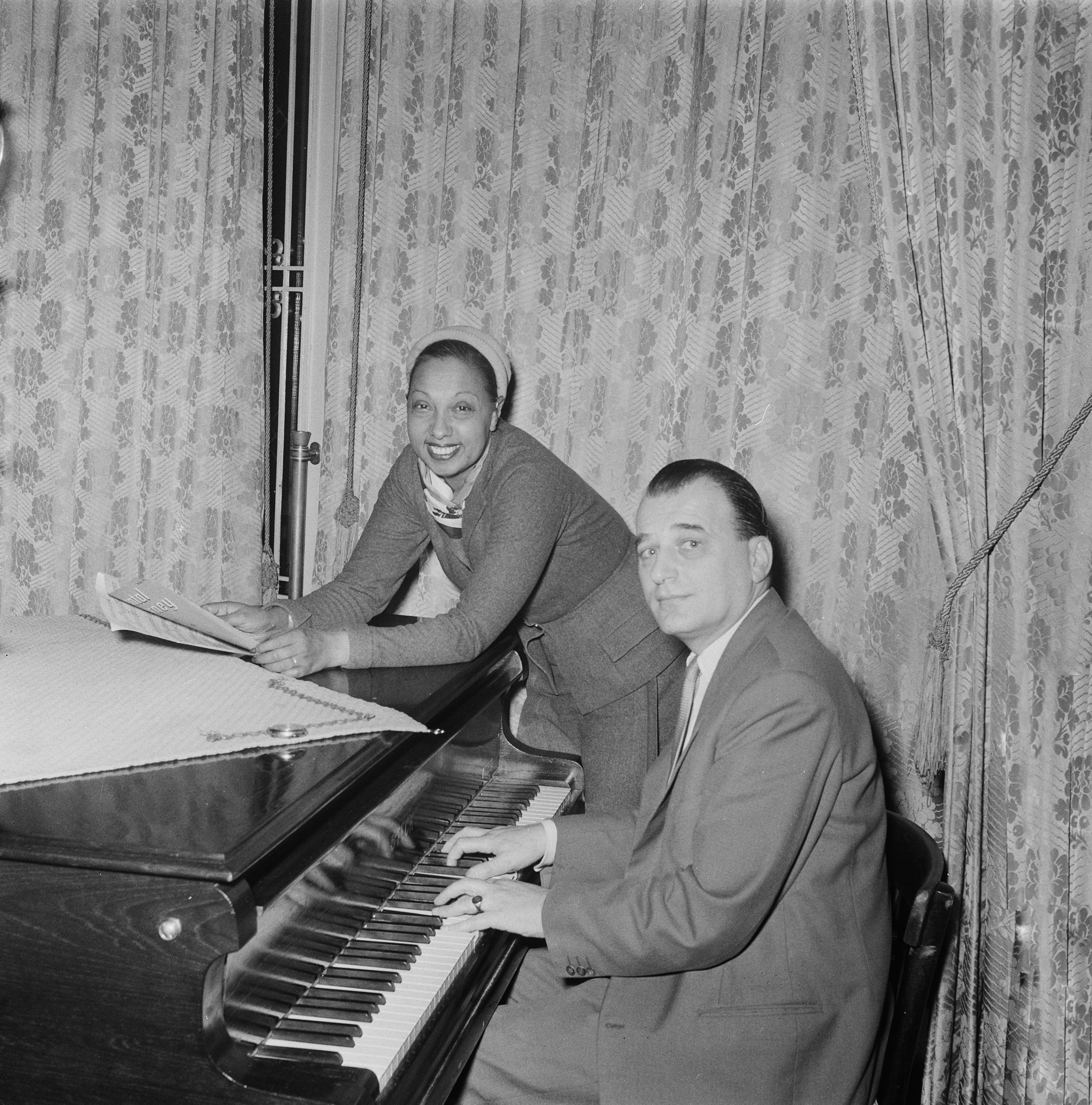 Collectie / Archief : Fotocollectie Anefo Reportage / Serie : [ onbekend ] Beschrijving : Josephine Baker in Amsterdam Datum : 22 maart 1954 Locatie : Amsterdam, Noord-Holland Trefwoorden : artiesten, danseressen, muziek, zangeressen Persoonsnaam : Baker Josephine Fotograaf : Noske, J.D. / Anefo Auteursrechthebbende : Nationaal Archief Materiaalsoort : Negatief (zwart/wit) Nummer archiefinventaris : bekijk toegang 2.24.01.03 Bestanddeelnummer : 906-3468